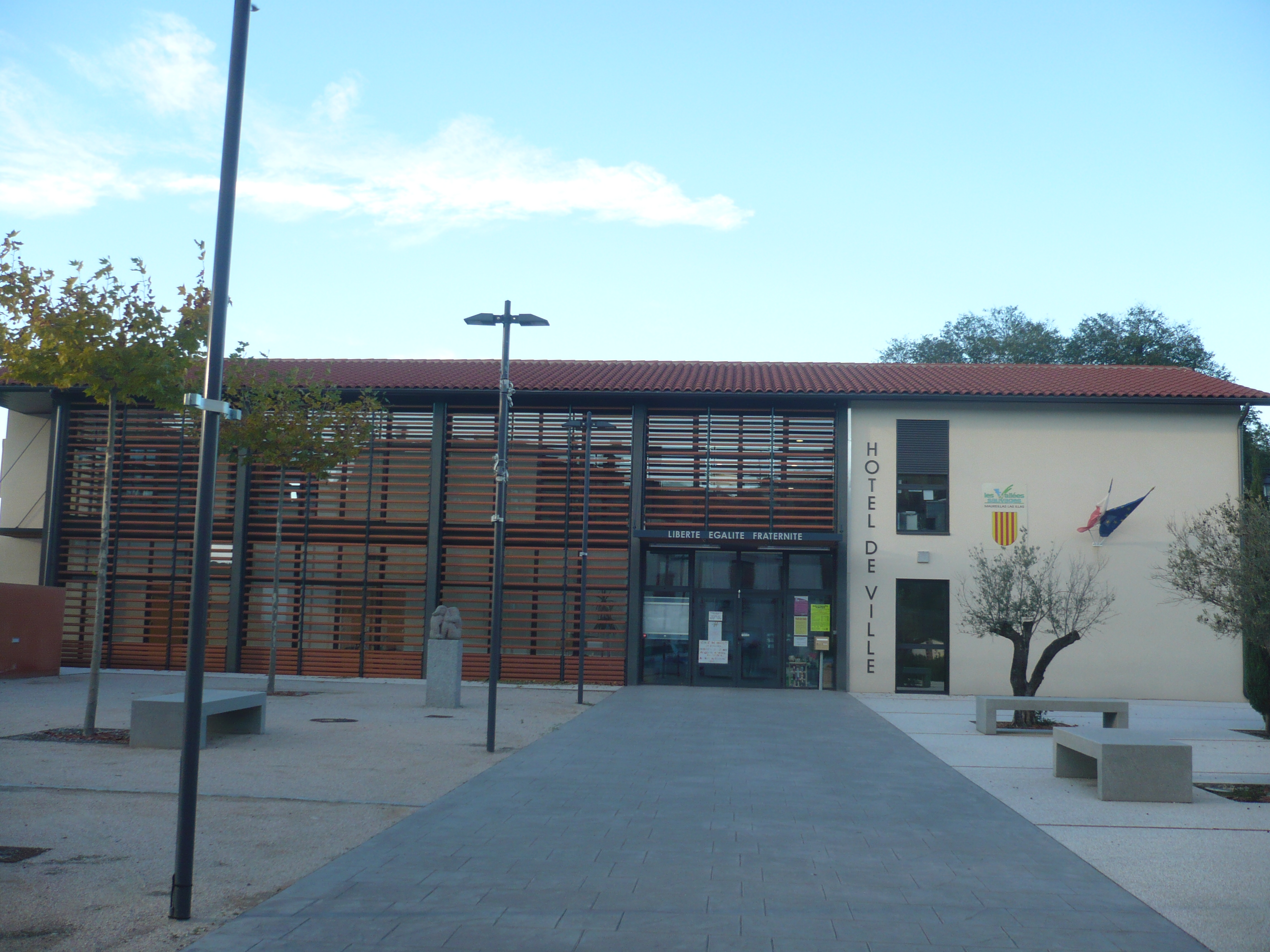 Nouvelle mairie de Maureillas-las-Illas